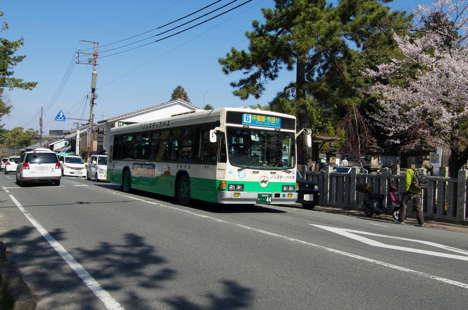 奈良交通奈良営業所いすゞKC-LV832N 6系統中循環・外回りで氷室神社付近を走行中